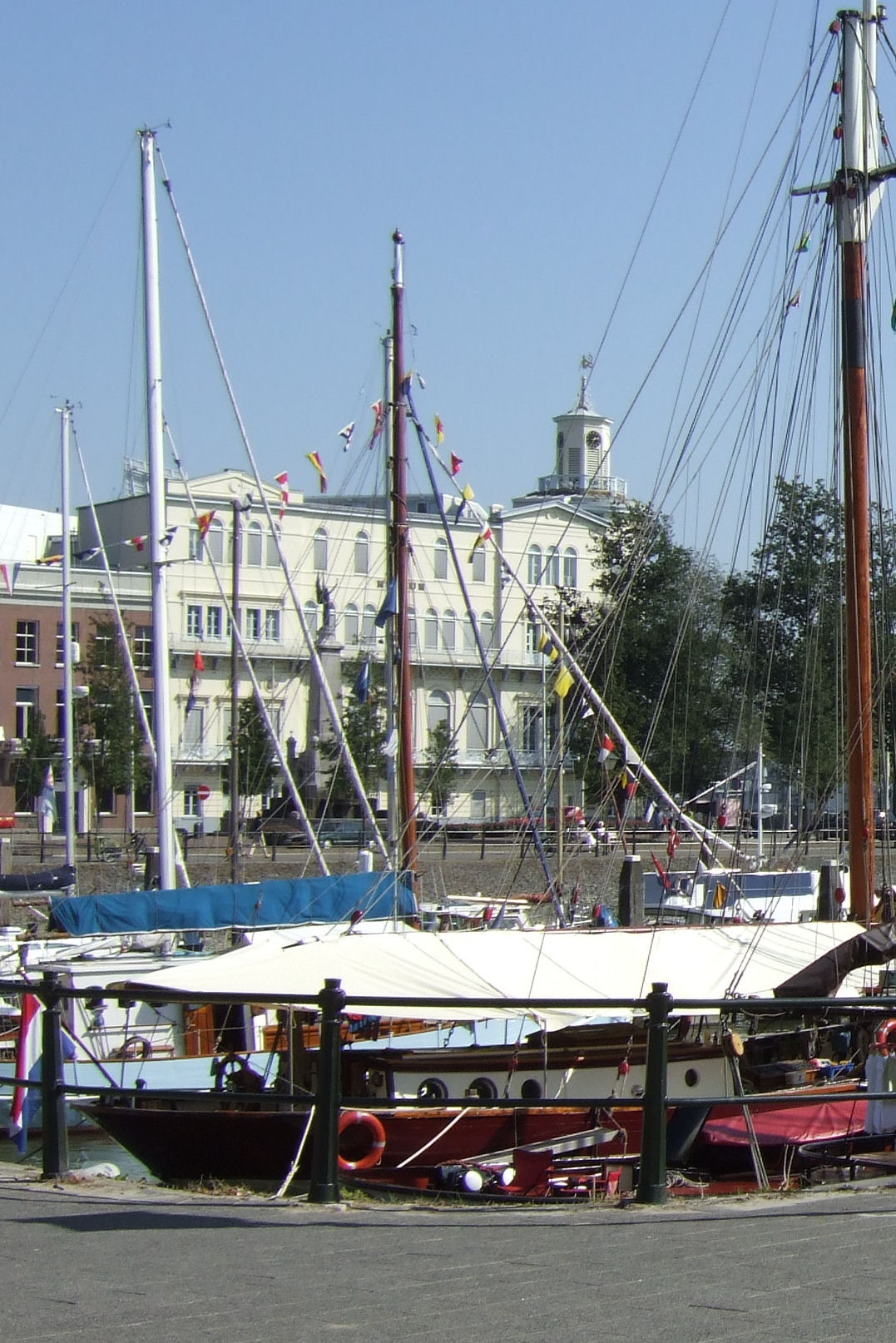 Wereldmuseum aan de Veerhaven, 10 september 2006 Categorie:Afbeelding Rotterdam